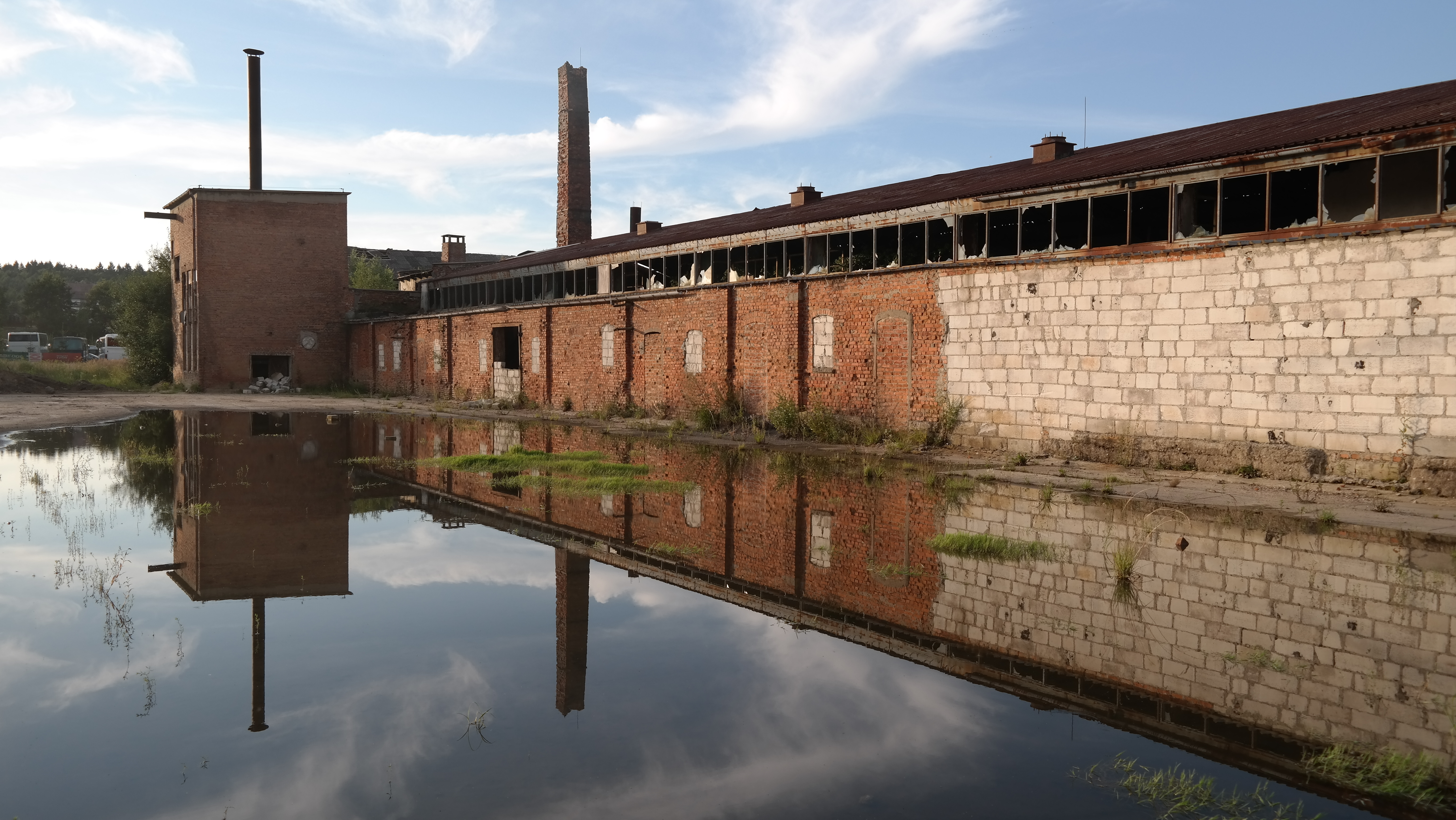 Ruiny opuszczonej cegielni w Somoninie